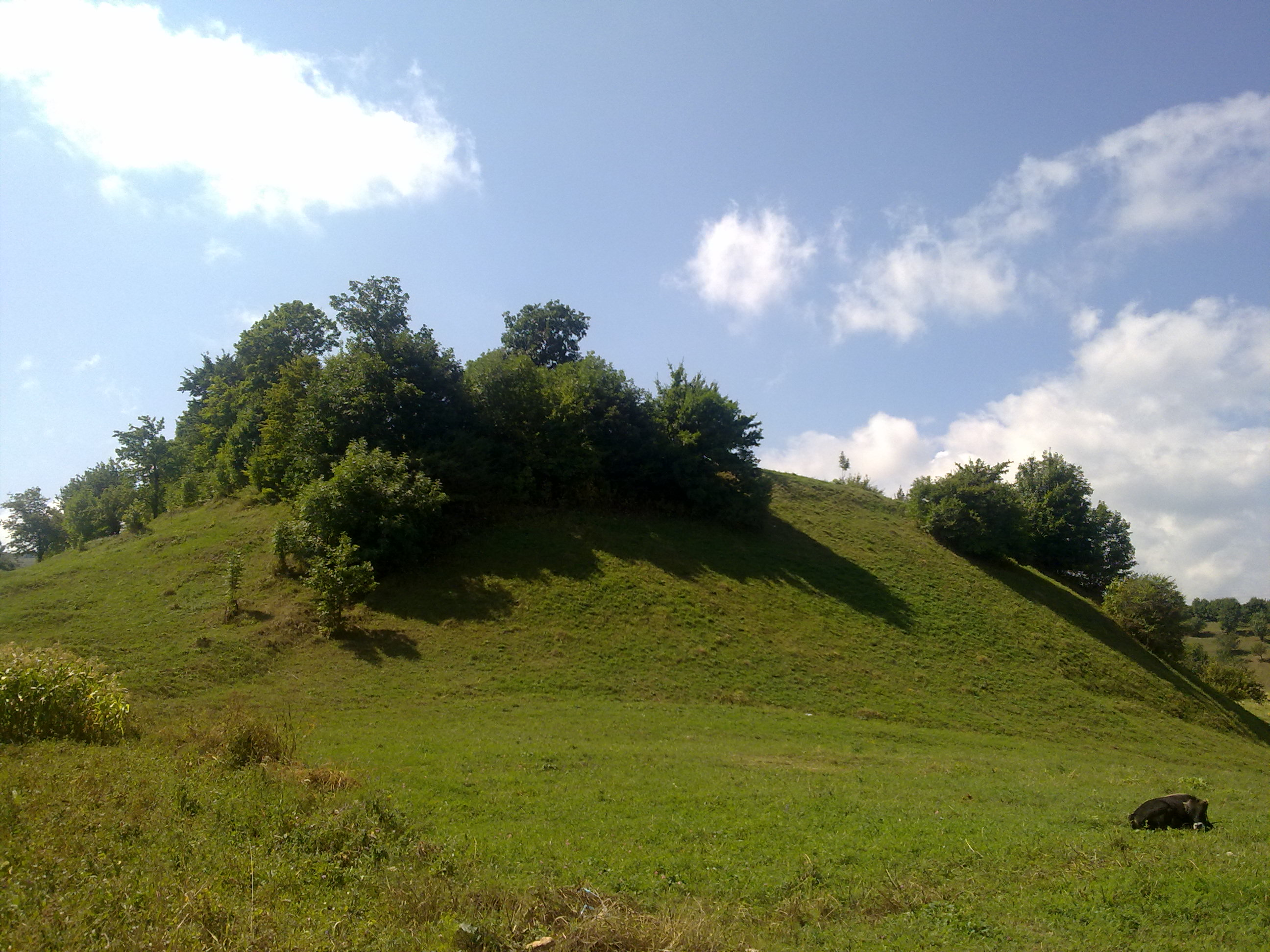 Հայաստանի Հանրապետության Տավուշի մարզի Նորաշեն գյուղում գտնվող կիկլպյան ամրոցի արտաքին տեսքը